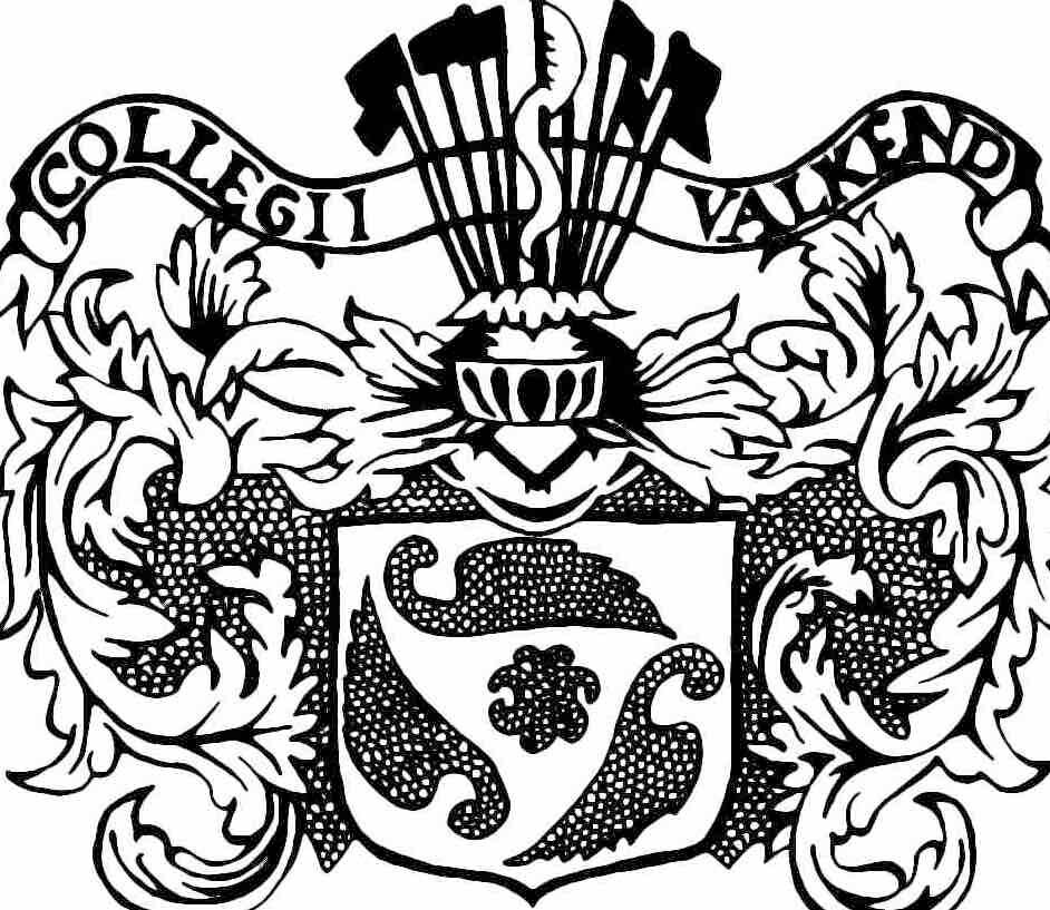 Valkendorfs Kollegiums våbenskjold